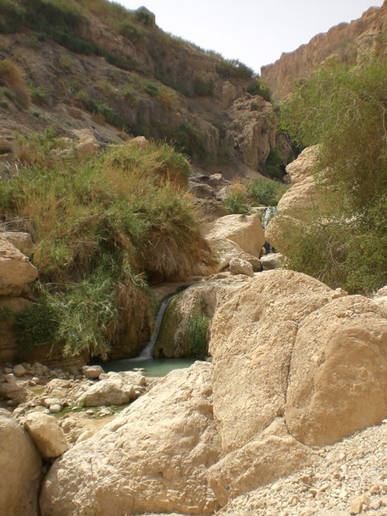 Nahal David, a corrente que nasce no oásis de Ein Gedi, Israel